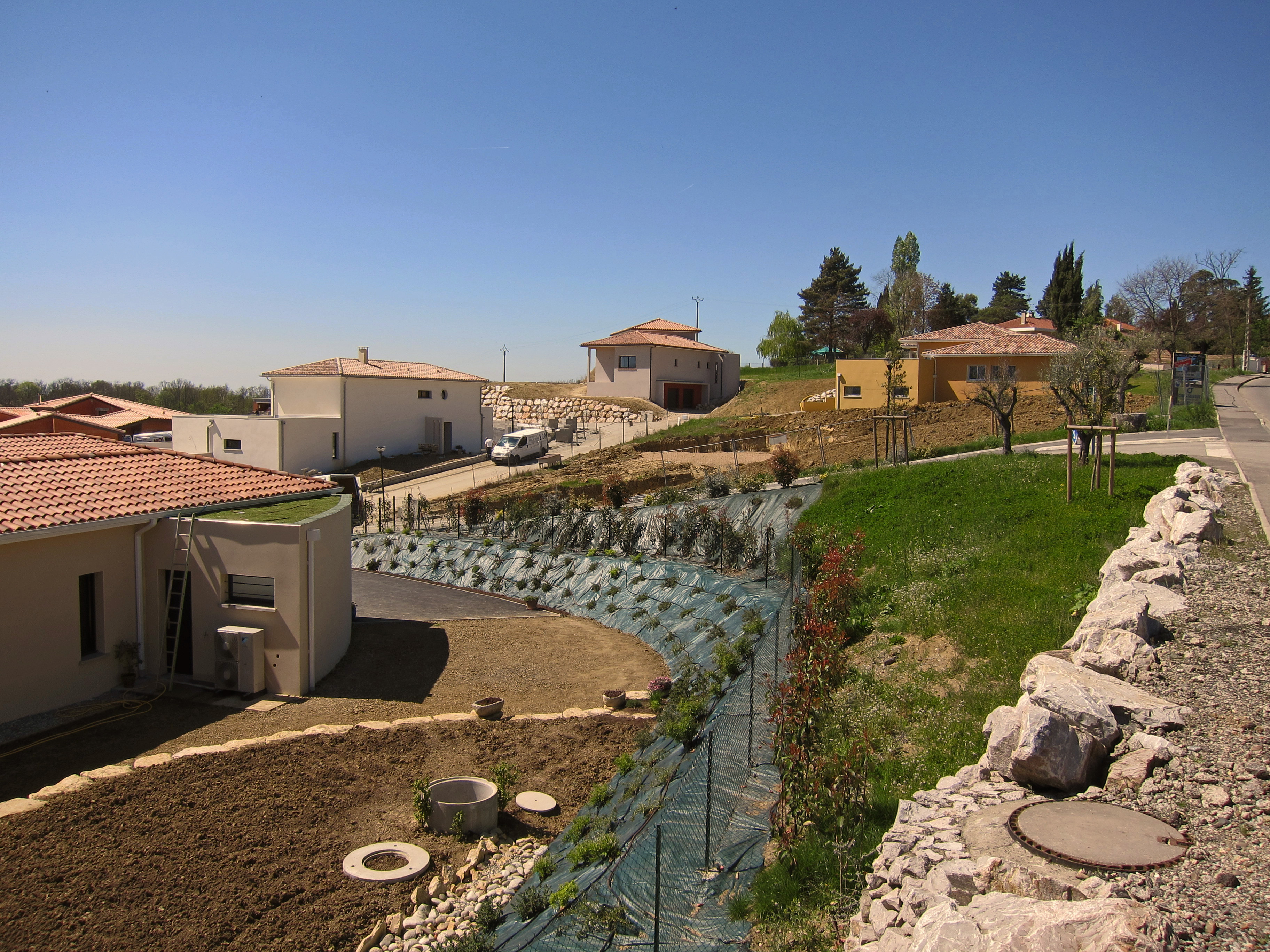 Rouffiac-Tolosan (Haute-Garonne, France) : Un lotissement en construction.